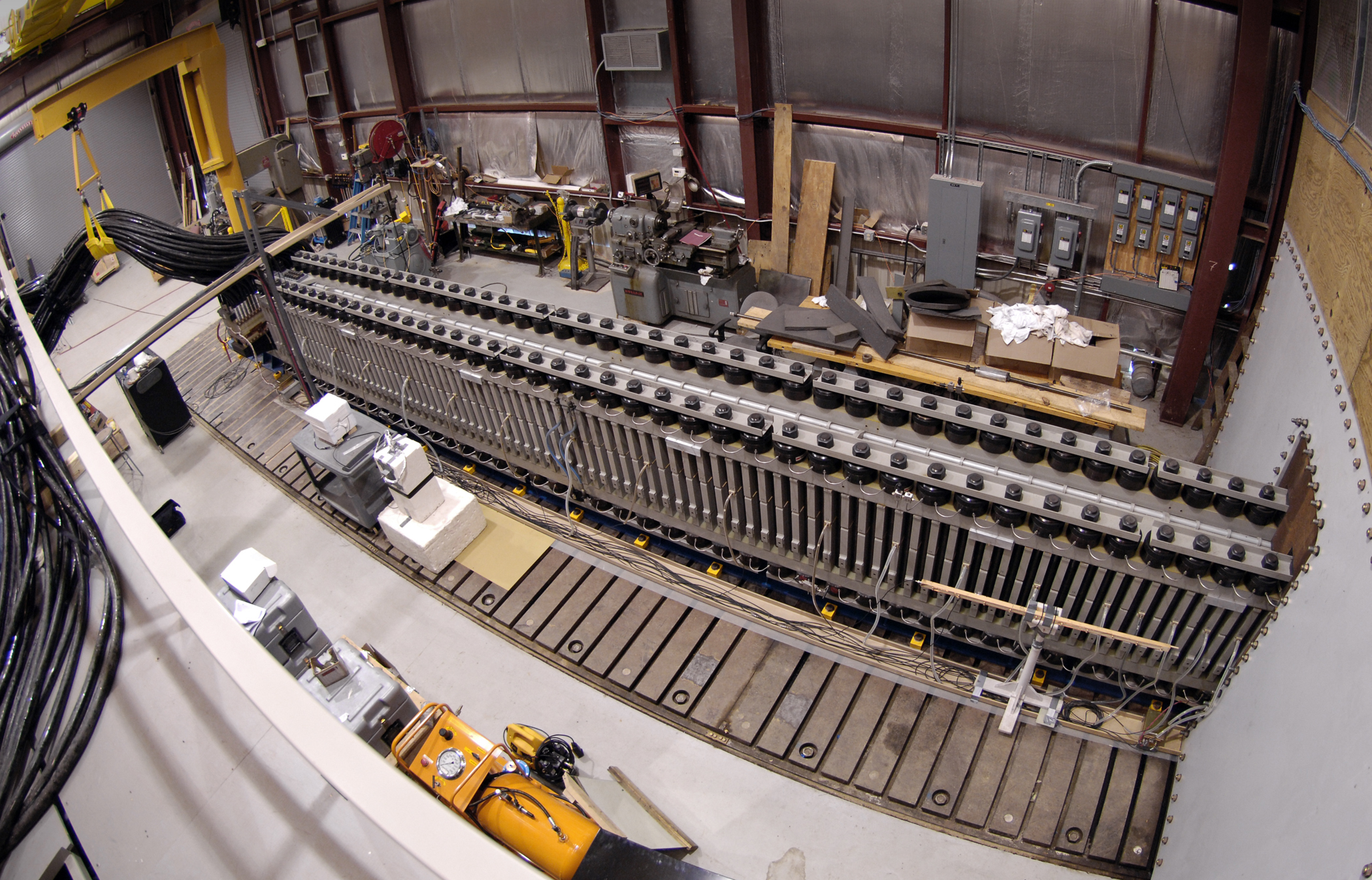 EMRG Railgun test system